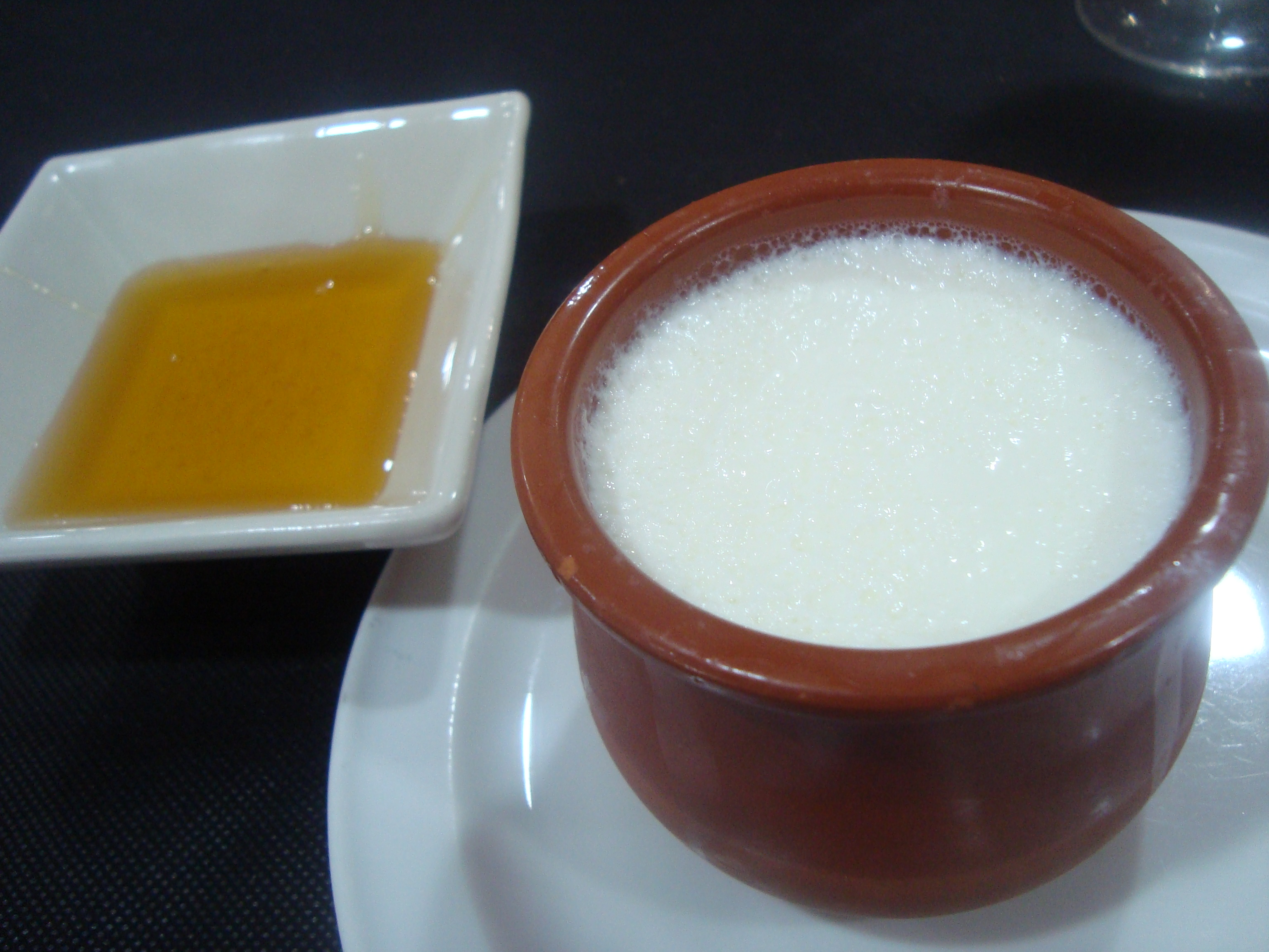 Collà de llet crua d'elaboració tradicional casera, feta amb llet d'ovella o de cabra i herba colera, és un postre dols molt típic del Maestrat Històric.